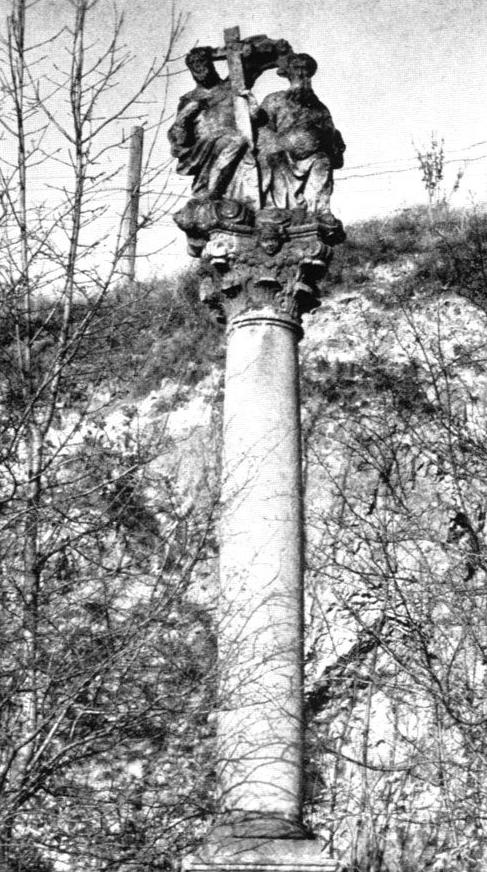 Kolumna Trójcy Świętej w Kłodzku na Szubienicznej Górze